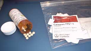 Tablets and Patches of Clonidine, Comprimés et patch transdermique de clonidine